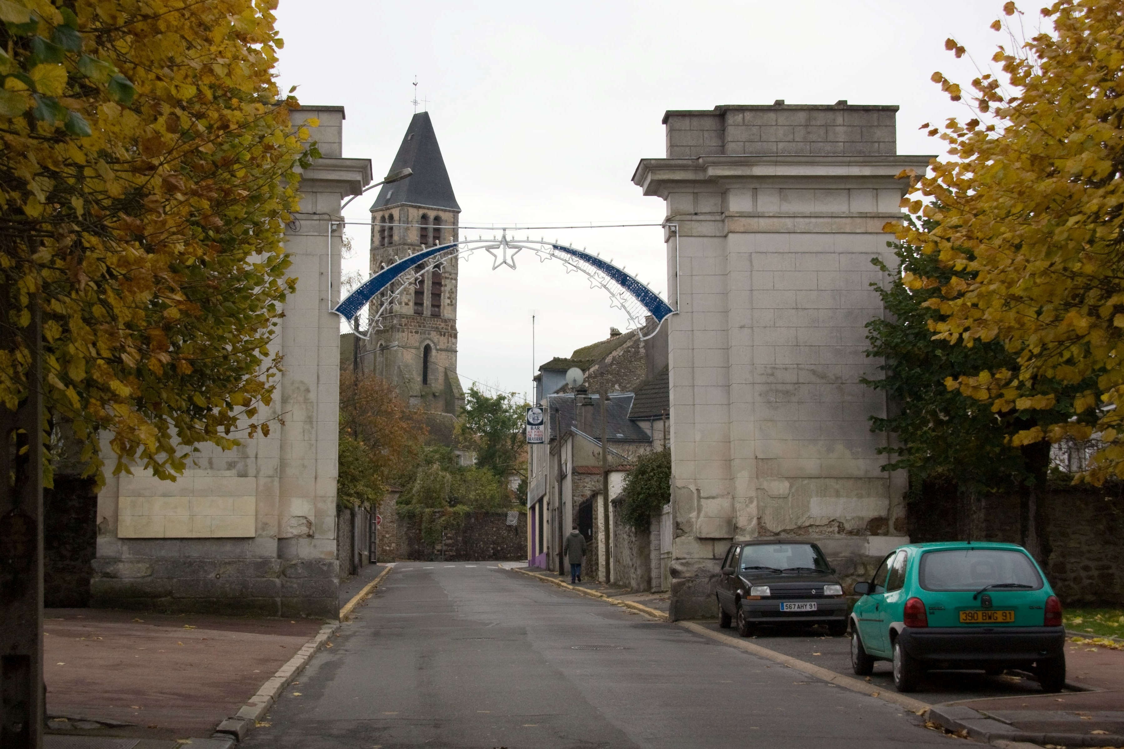 L'ancienne porte de Paris et l'église Saint-Pierre de Mennecy / Mennecy, Essonne, France